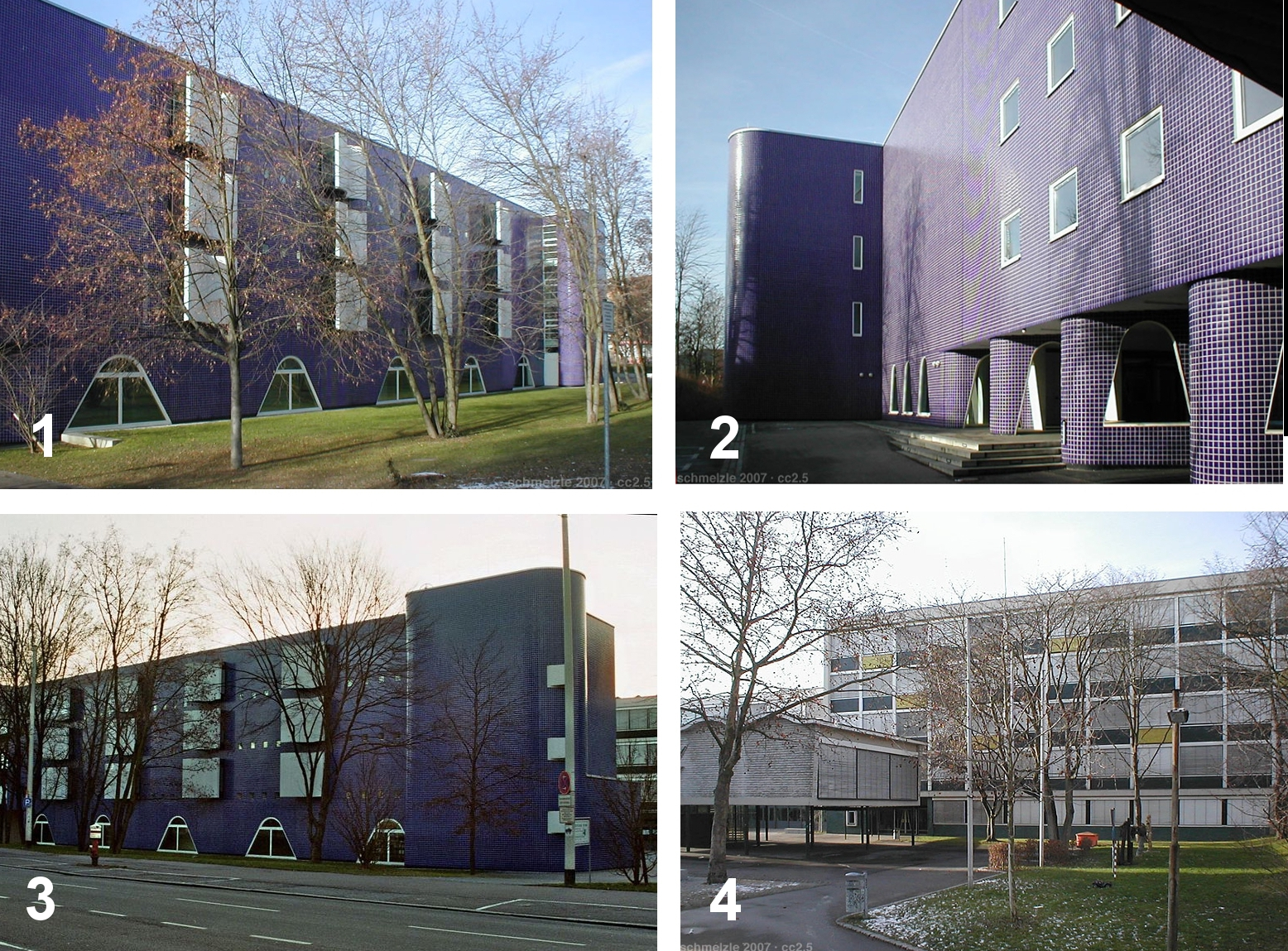 Gustav-von-Schmoller-Schule in Heilbronn, 2003, Heilbronn, Frankfurter Straße 63. Architekten: Lederer Ragnarsdóttir Oei (LRO).1-3 Neubau, 4 Altbau und Pavillon von 1957.